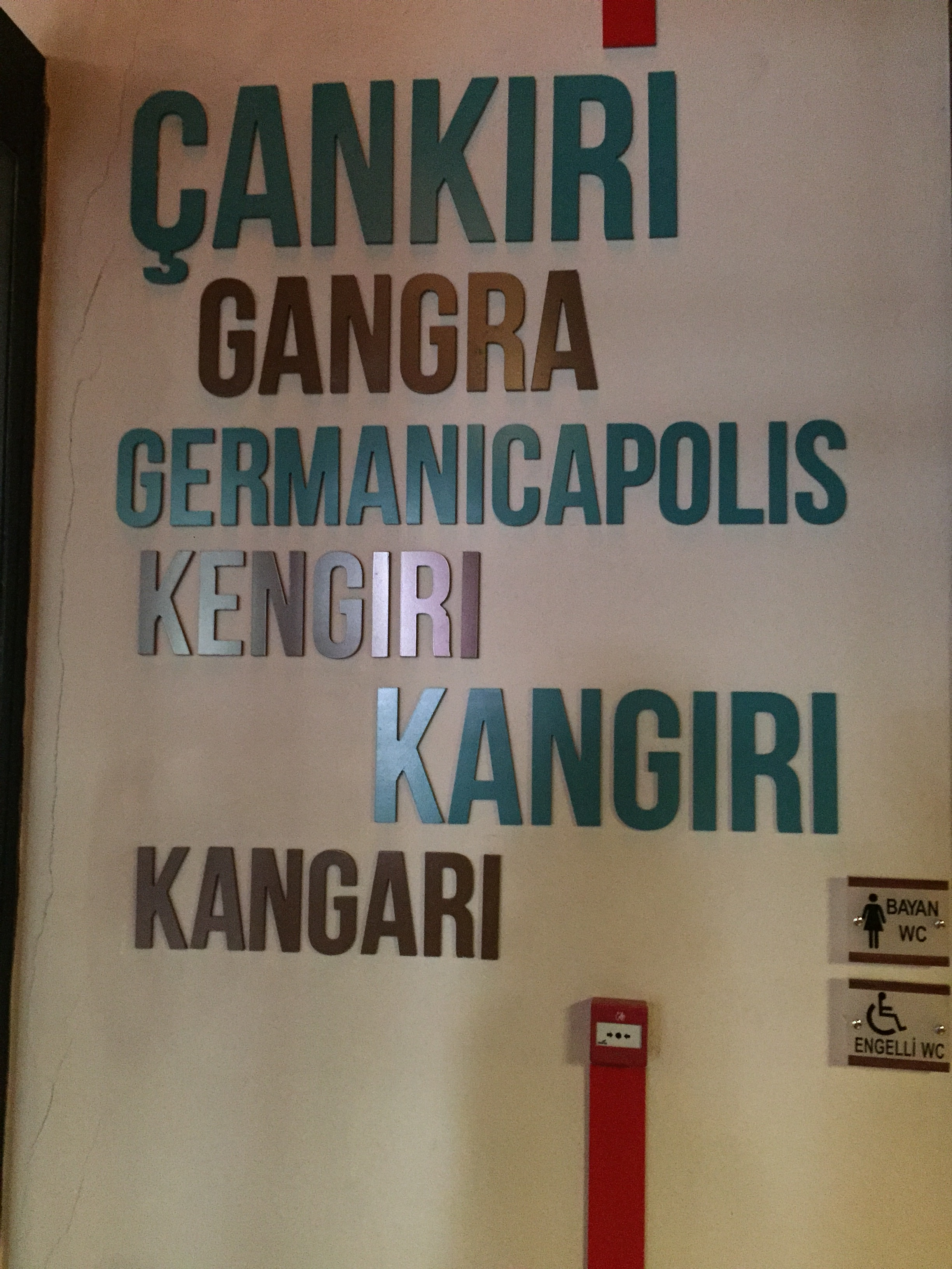 Çankırı Müzesinden bir görünüm.